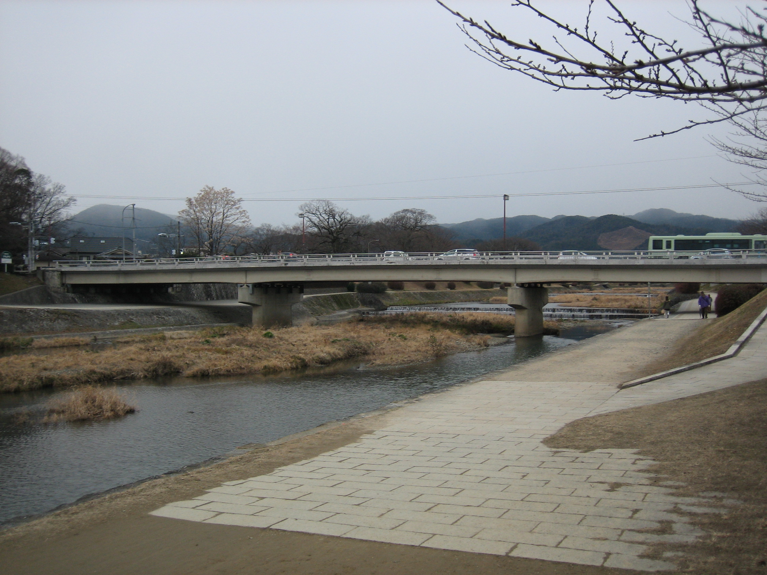 上賀茂橋を橋東詰河川敷から撮影